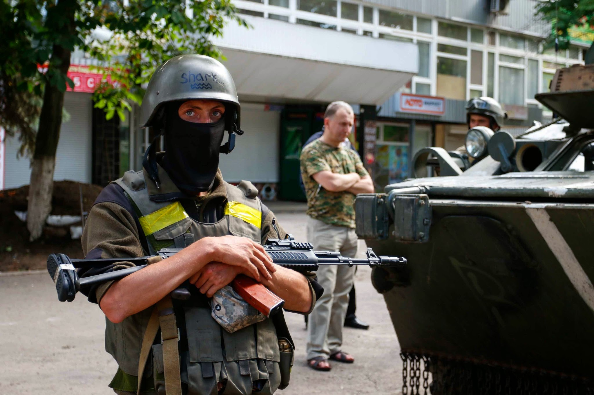 Славянск